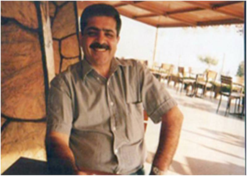 Ahmet Günbaş